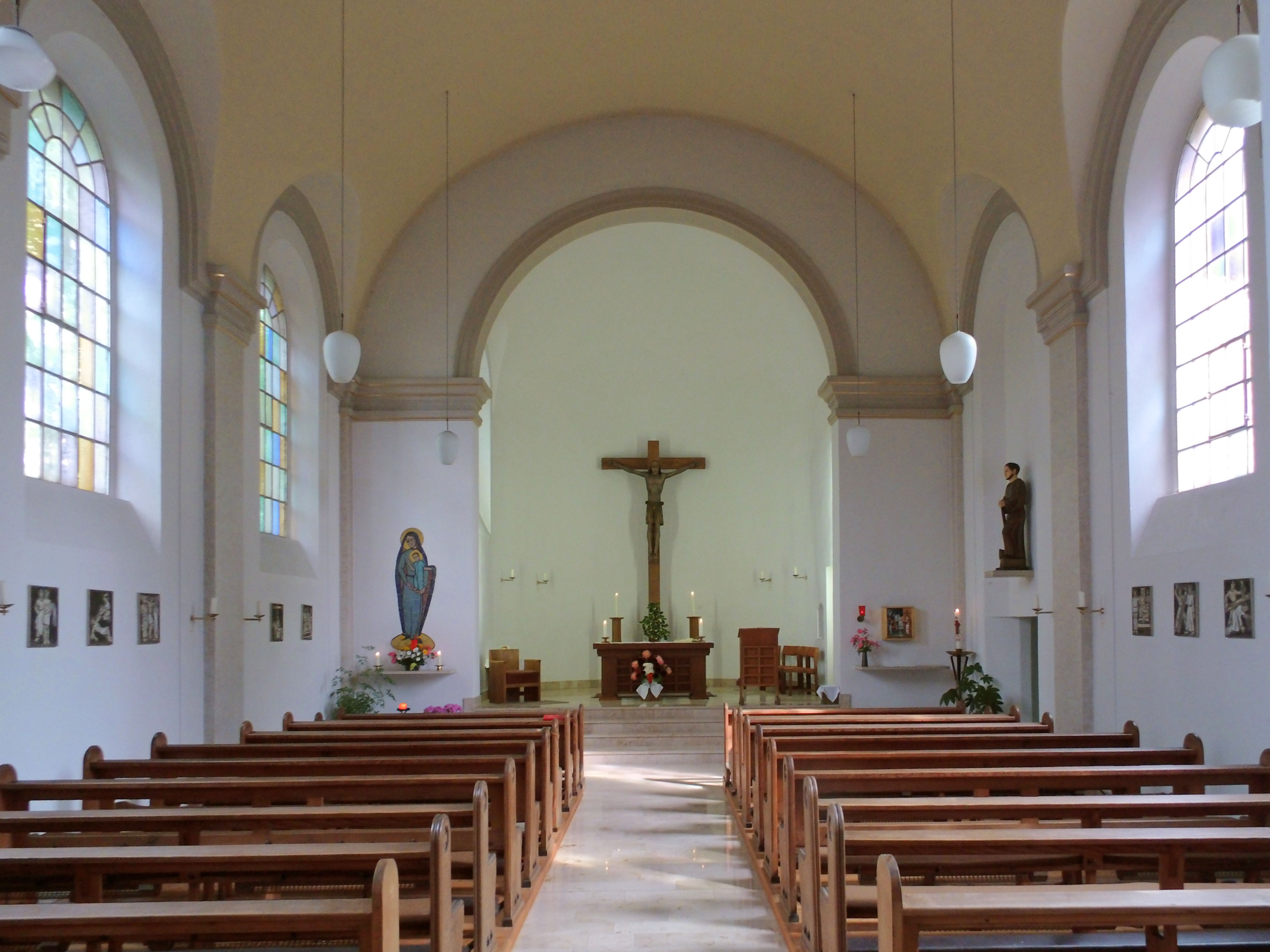 Katholische Kirche "St. Joseph und Theresia vom Kinde Jesu" in Weferlingen (Sachsen-Anhalt)